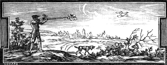 Plate from "La Chasse au Fusil" (1781), by G.-F. Magné de Marolles (1727-1792)